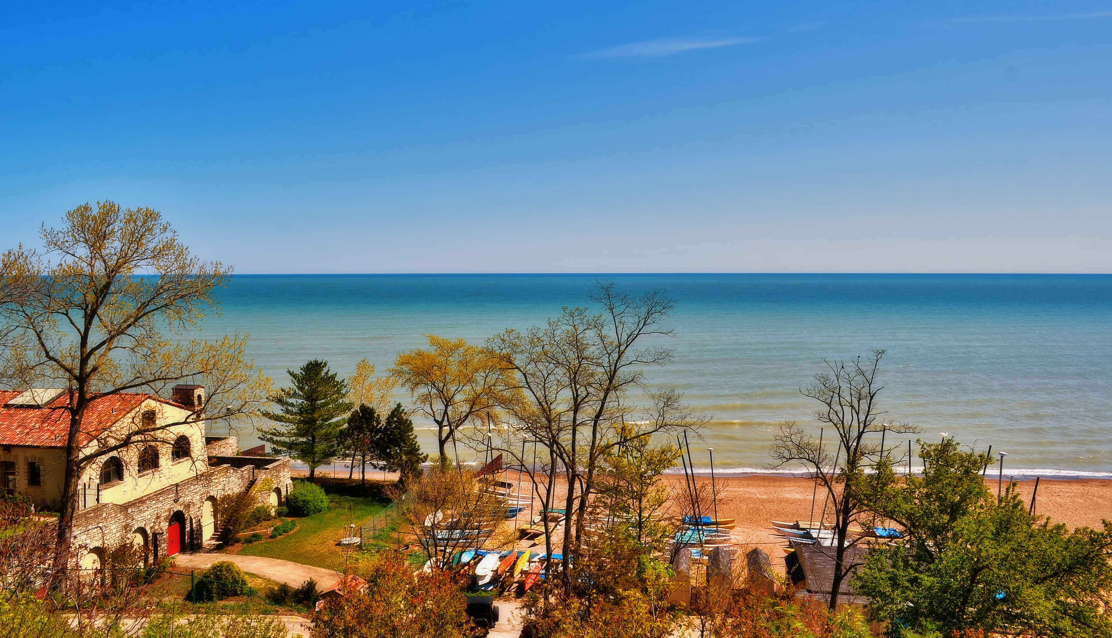 Glencoe, IL, USA